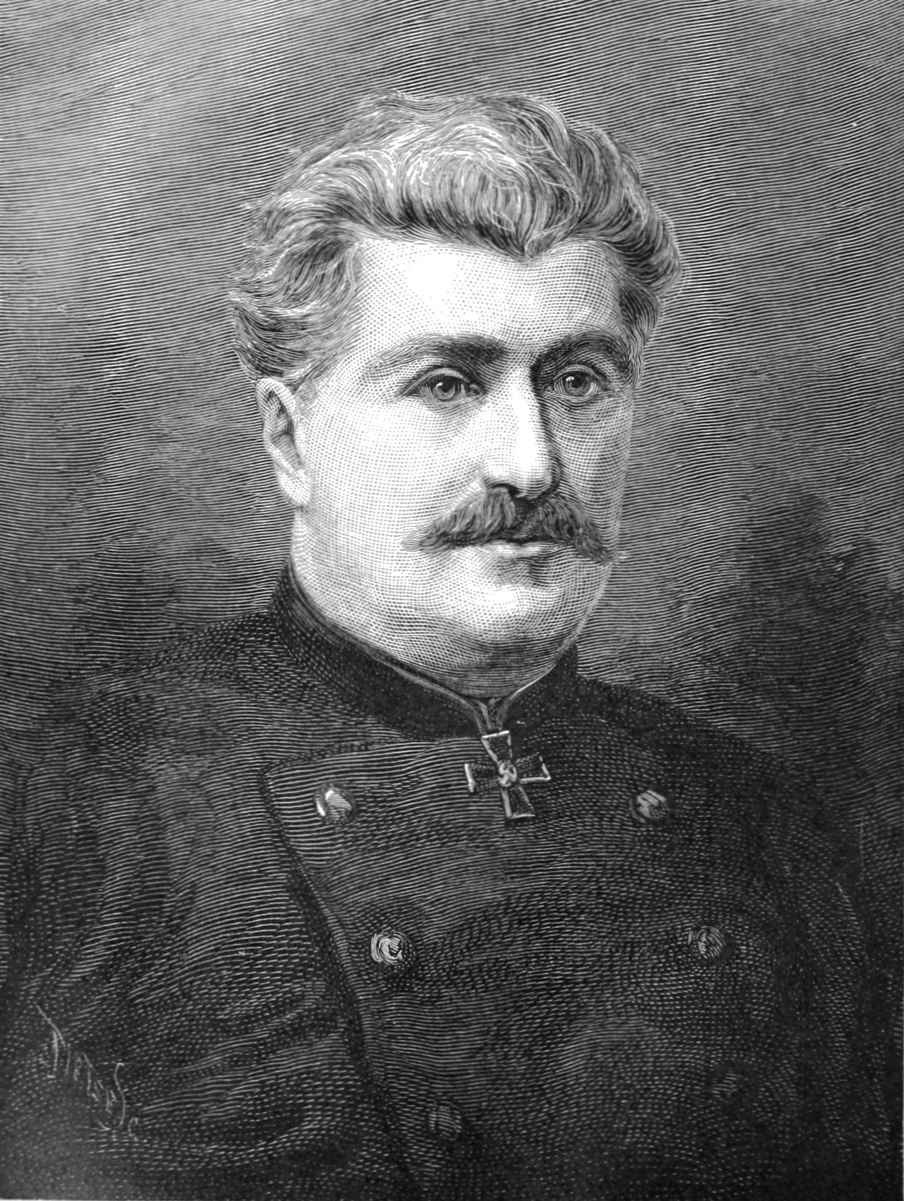 Nicholas Prejevalsky